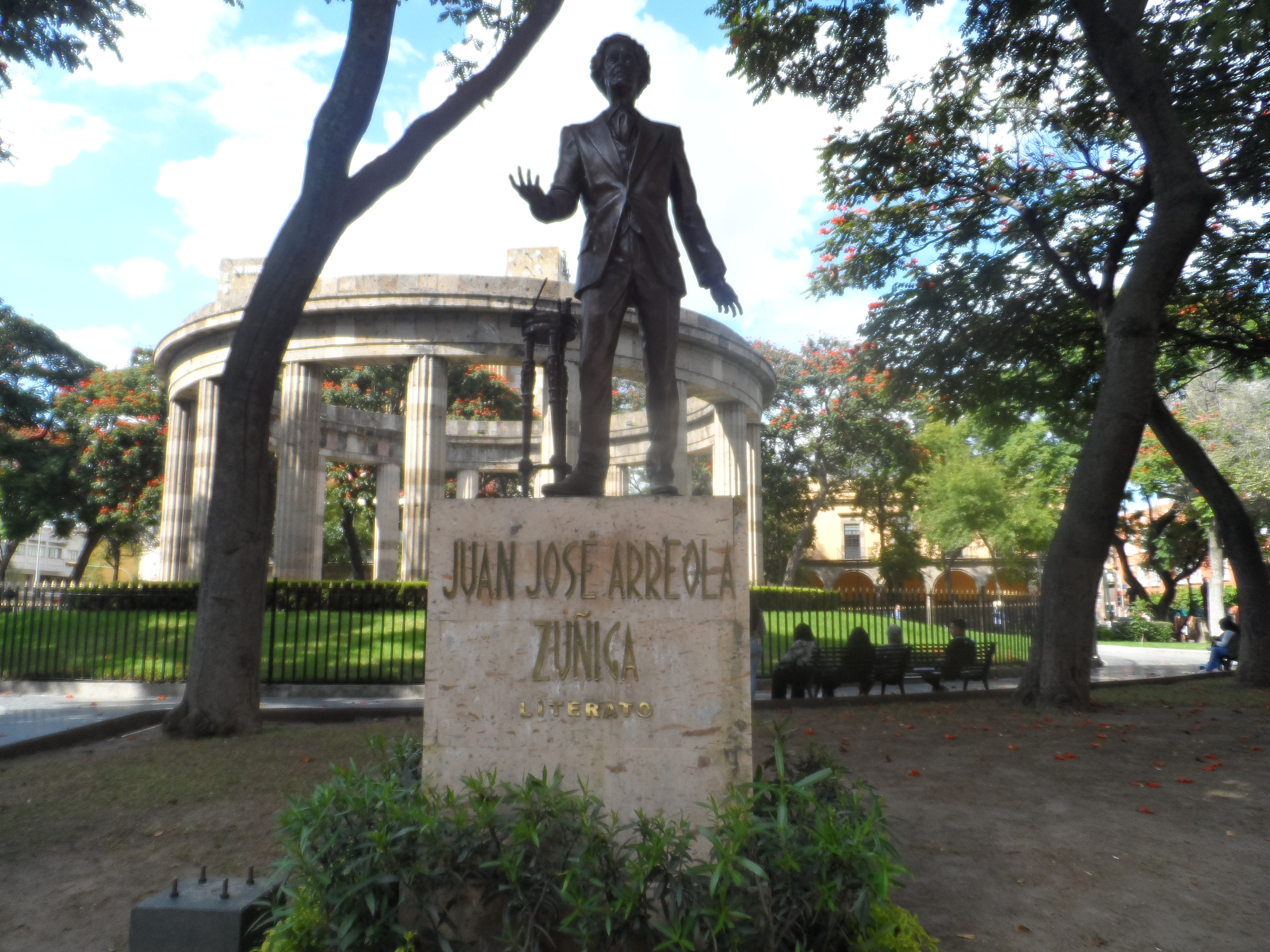 Estatua del escritor jalisciense Juan José Arreola en la "Rotonda de los Jaliscienses Ilustres".